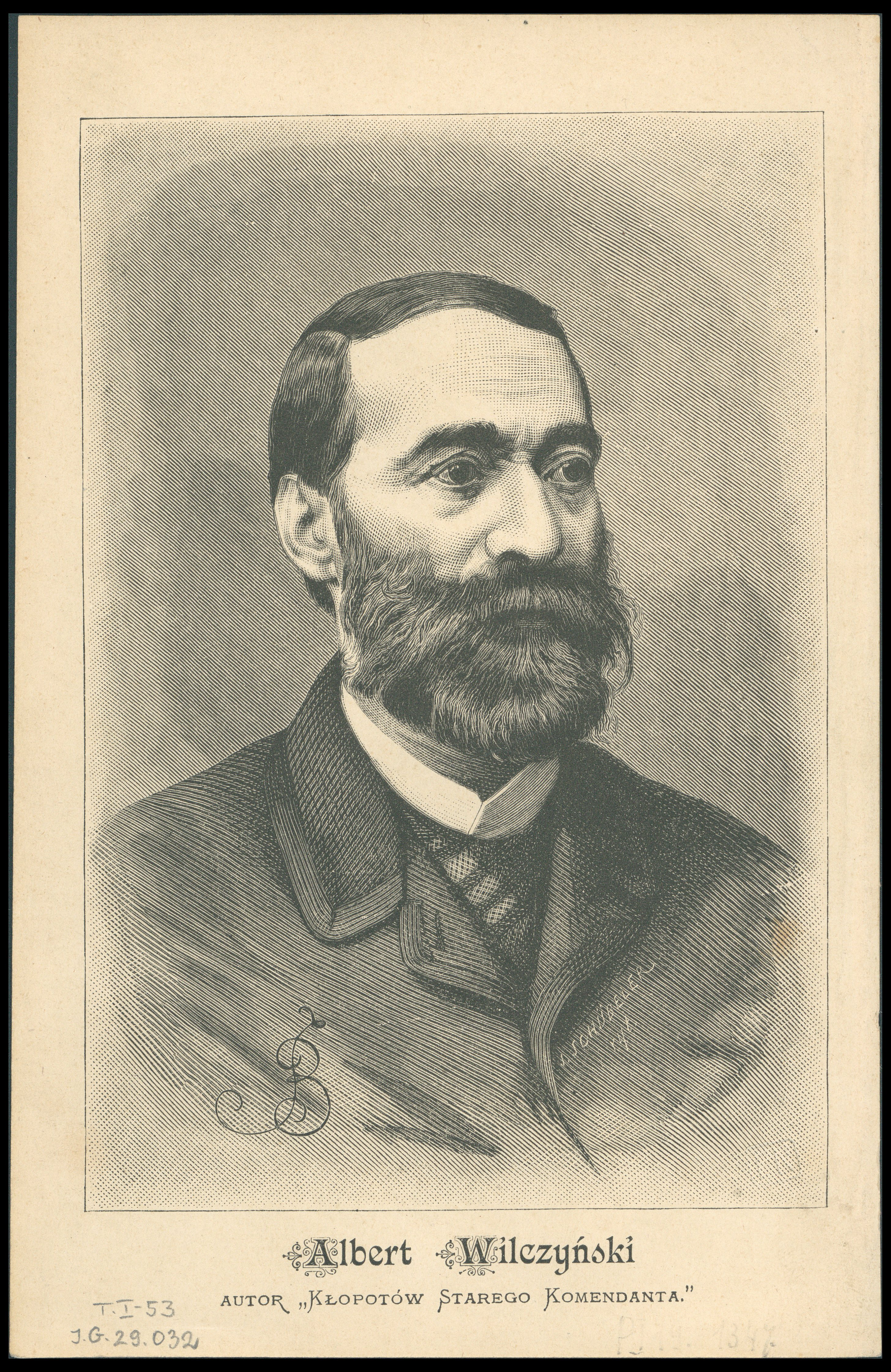 Albert Wilczyński, 1885 r.